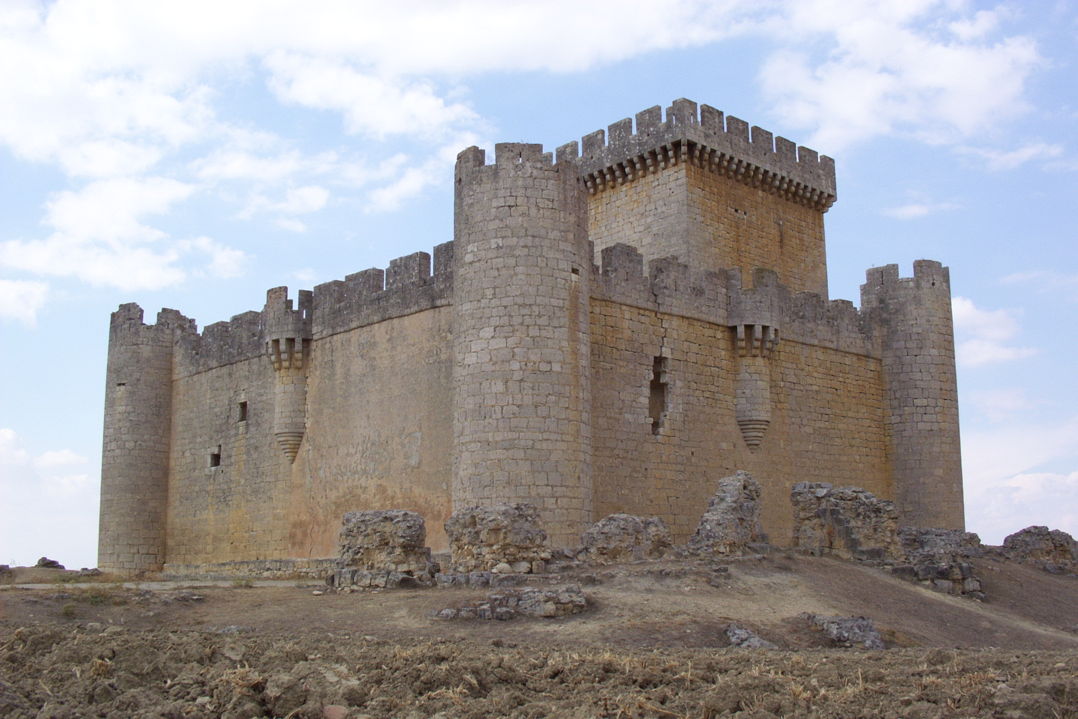 Vista del Castillo situado en la localidad de Villalonso, provincia de Zamora